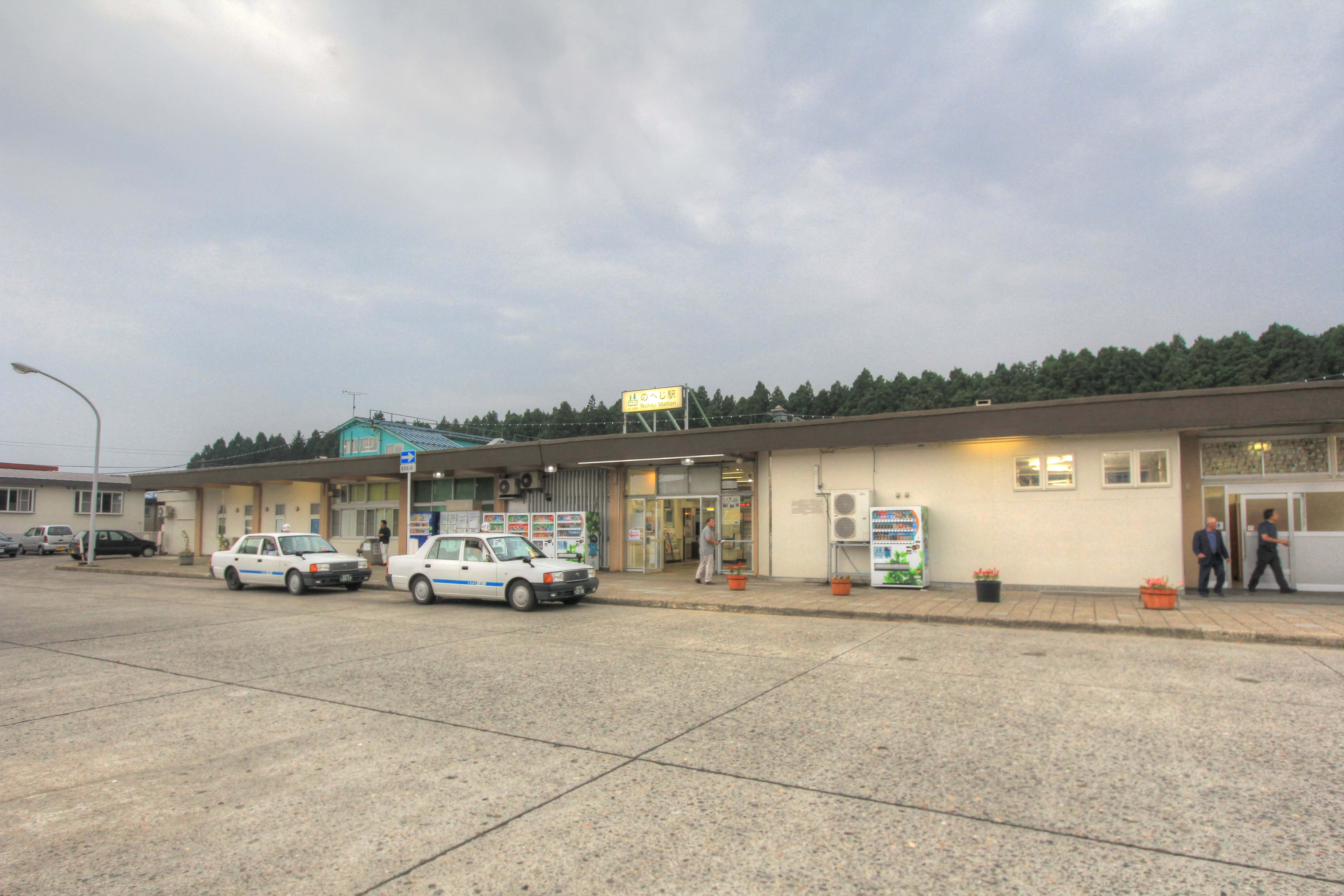 野辺地駅